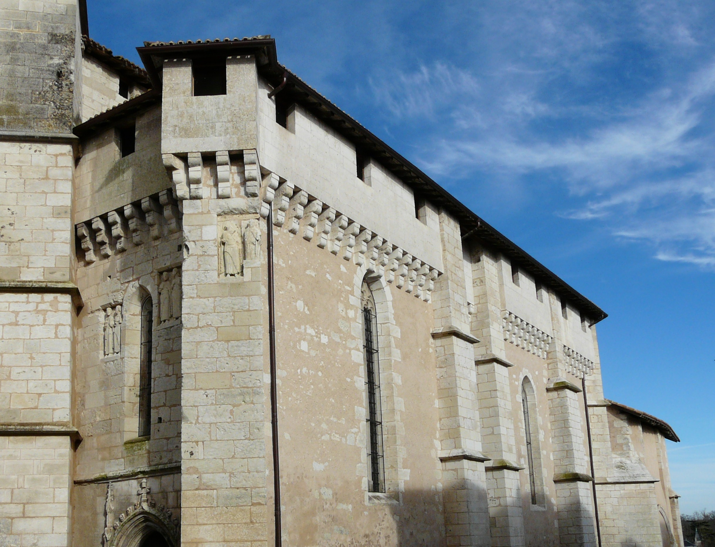 Le chemin de ronde fortifié de l'église Saint-Astier, Saint-Astier, Dordogne, France